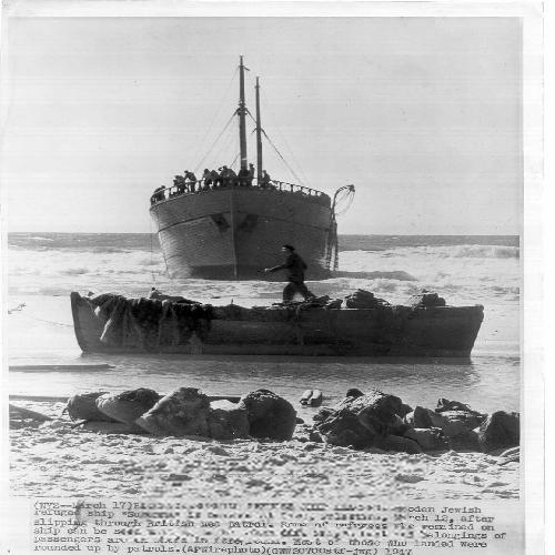 1947 - חוף עזה - האוניה "סוזנה" עוגנת לאחר שפרצה את ההסגר הימי הבריטי עם פליטים יהודיים